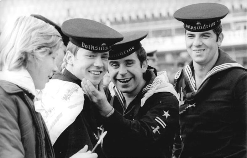 Berlin, 25. Jahrestag DDR-Gründung, Besucher ADN-ZB Katscherowski 8.10.74 Berlin-25. Jahrestag-Besucher aus allen Bezirken der DDR verlebten frohgestimmt den Geburtstag der Republik.